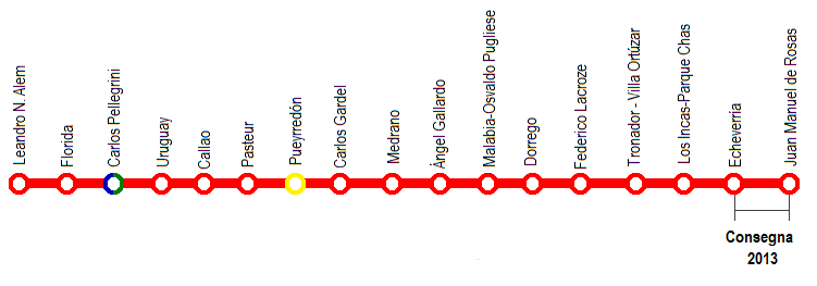 Raffigurazione grafica Linea B Buenos Aires